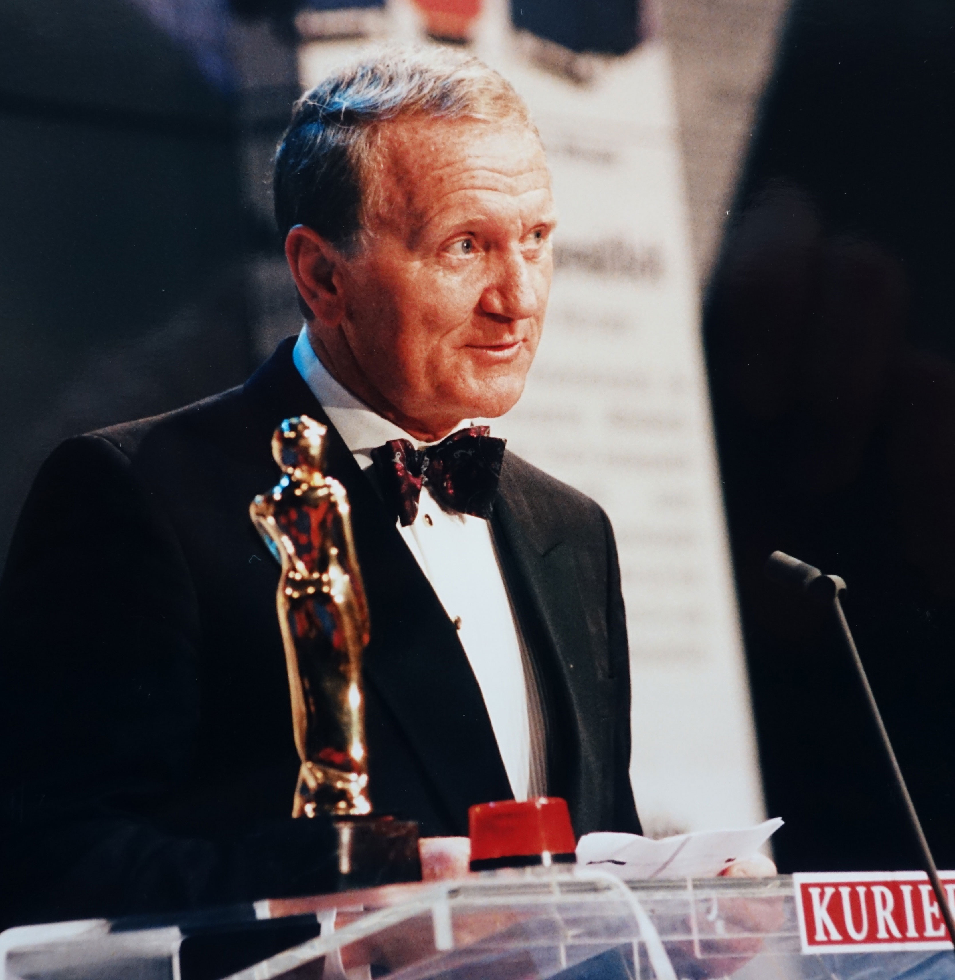 ROMY-Verleihung